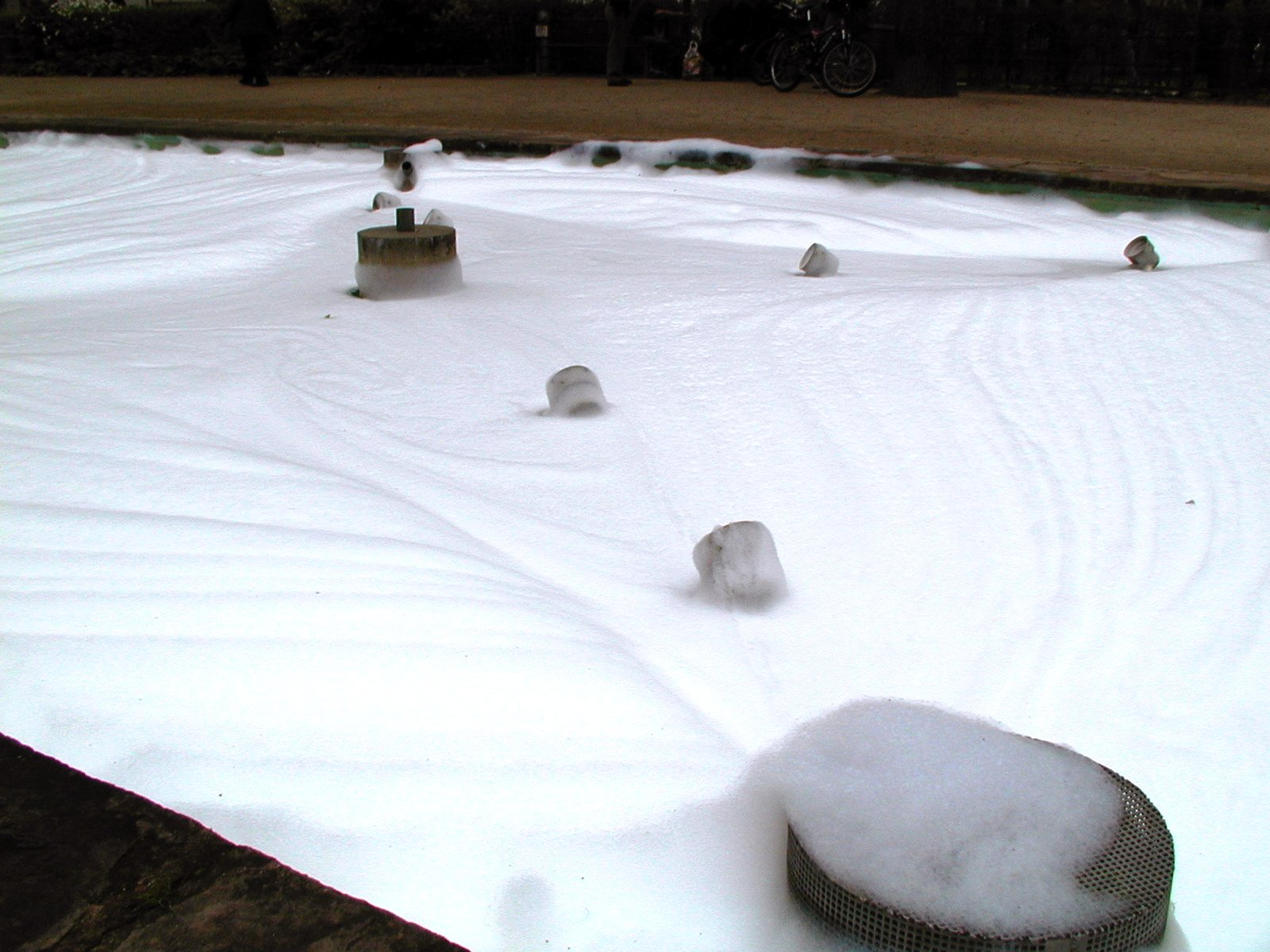 Spülmittel-Anschlag auf den Springbrunnen in der Fürther Adenaueranlage